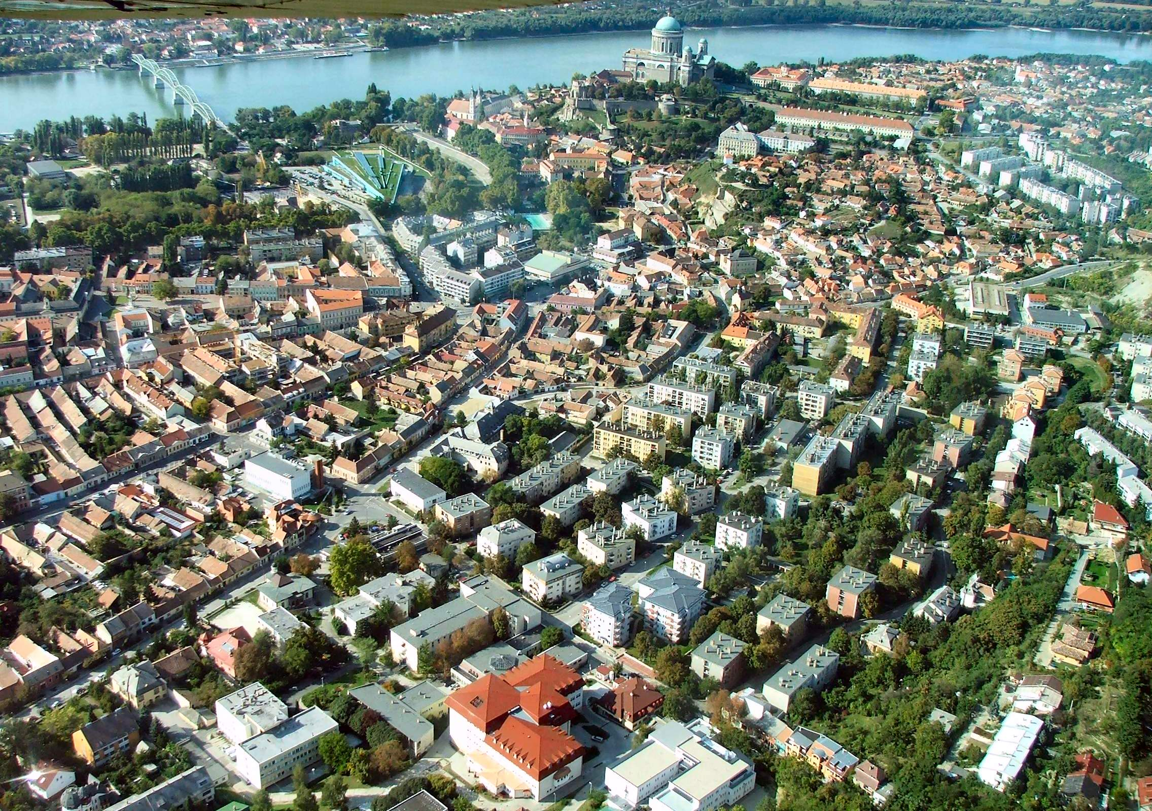 Esztergom légifotó